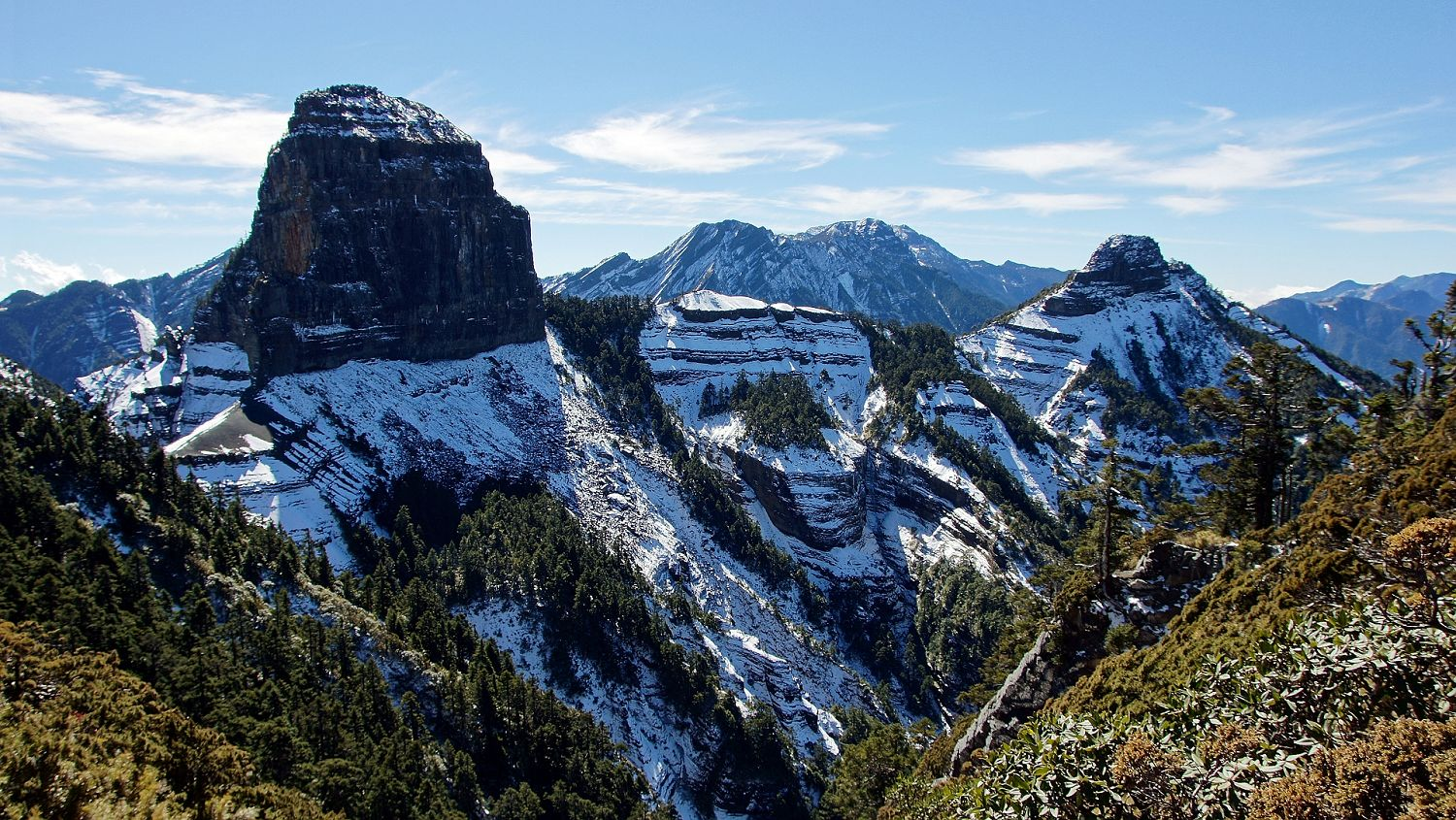 中文（台灣）: 大、小霸尖山冬景